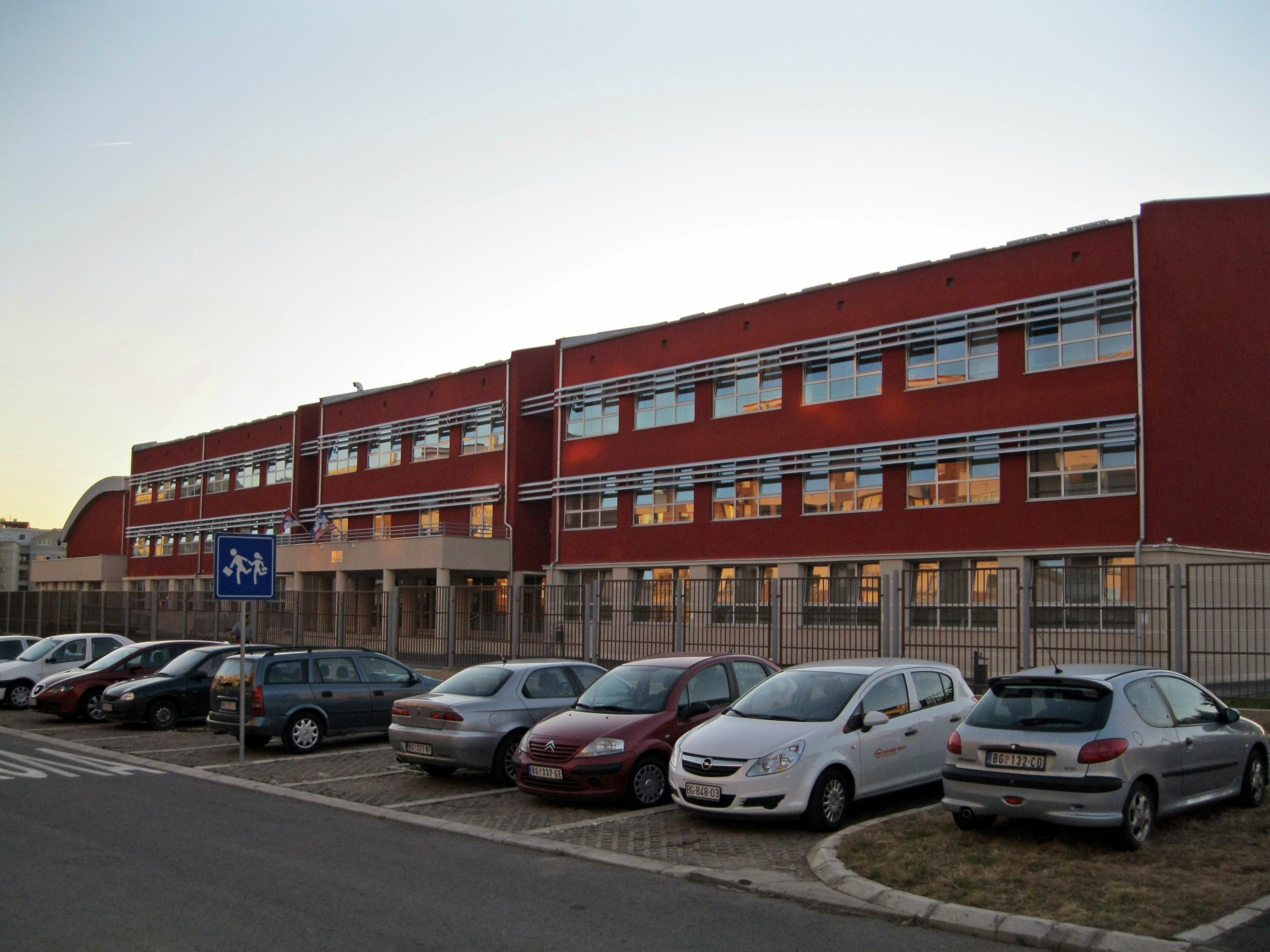 Основна школа "Драган Лукић" саграђена 2011. године.